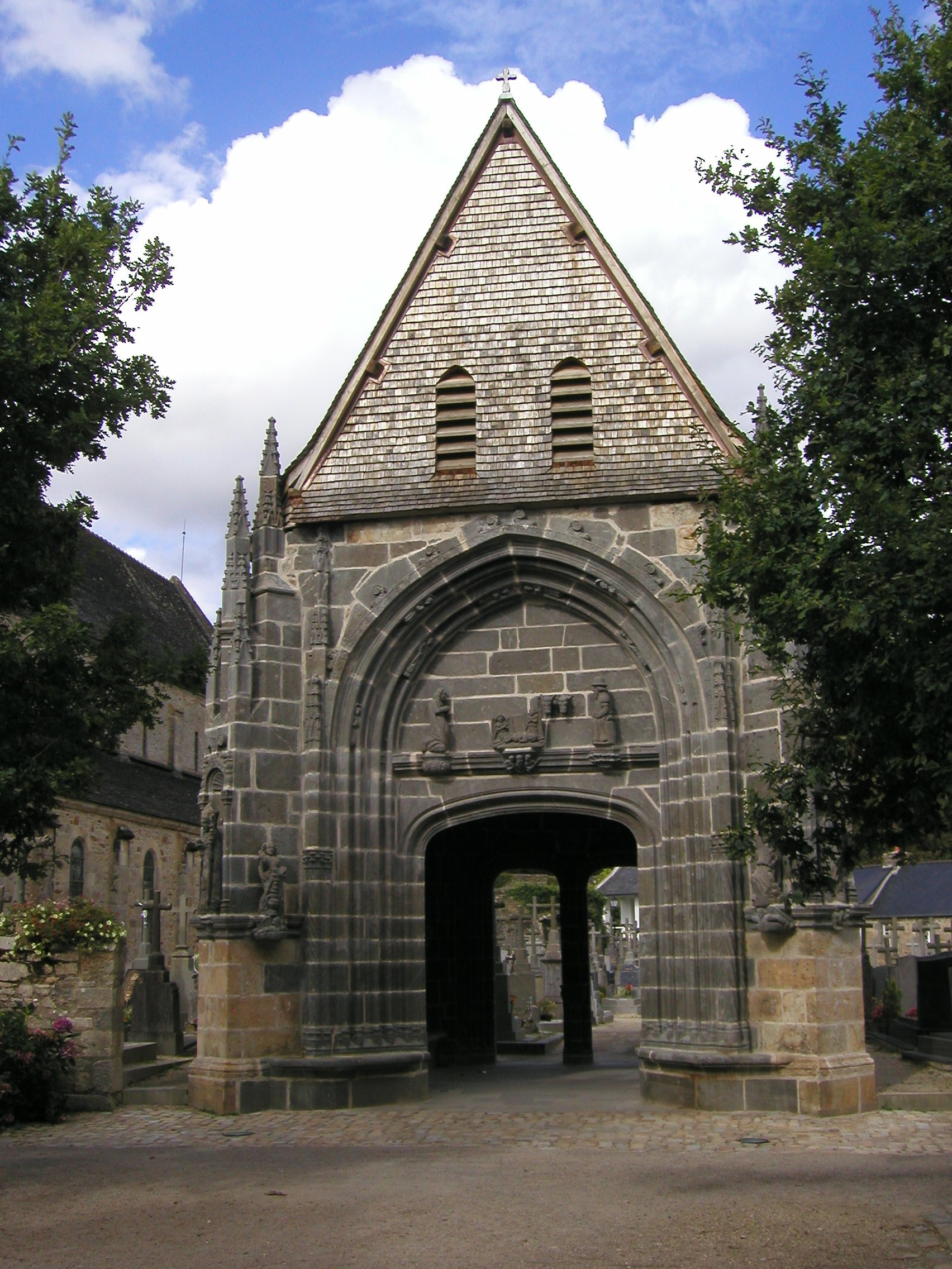 Friedhofsportal der Abtei von Daoulas